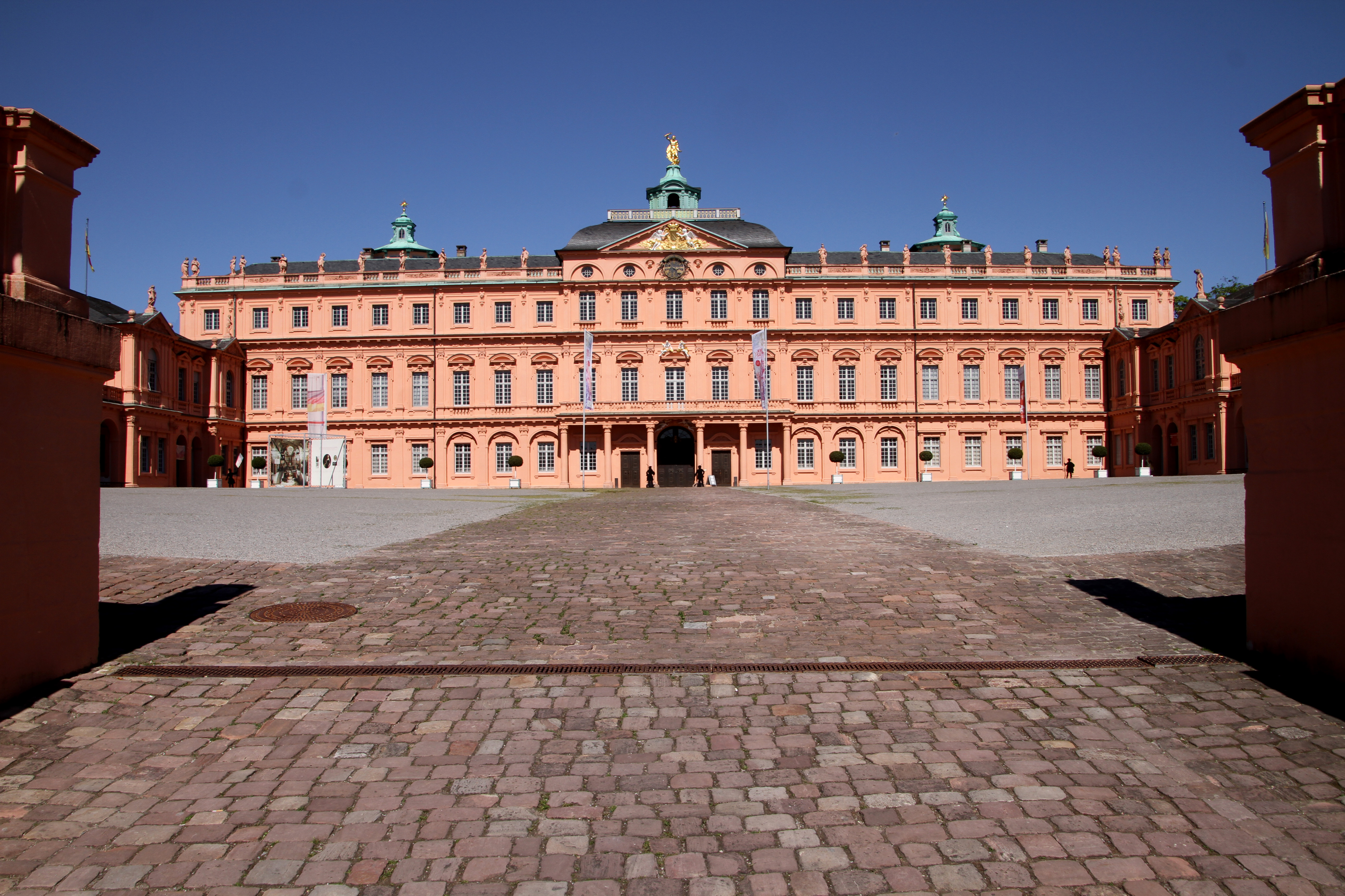 Residenzschloss der Markgrafen von Baden-Baden in Rastatt.